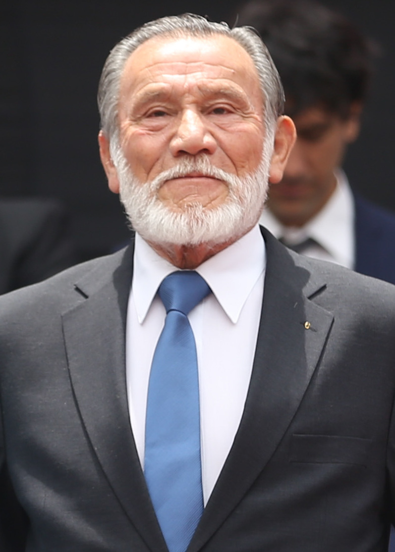 La Presidenta Michelle Bachelet encabeza la ceremonia de Los Premios del Deporte 2017 en La Moneda. Deportistas, técnicos y federaciones presentes. Felicitaciones a tod@s!. En la fotografía: Michelle Bachelet junto a Claudio Lucero Martínez. Lucero (Iquique, 19 de mayo de 1933)​ es un profesor de educación física, montañista, escalador, rescatista y entrenador de montañismo chileno.